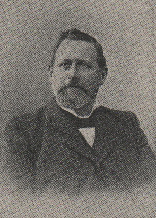 Photo d'Edouard Quartier-La-Tente (1855-1925) tiré du compte-rendu de la 6ème Manifestation maçonnique Internationale de 1913, tenue à La Haye.